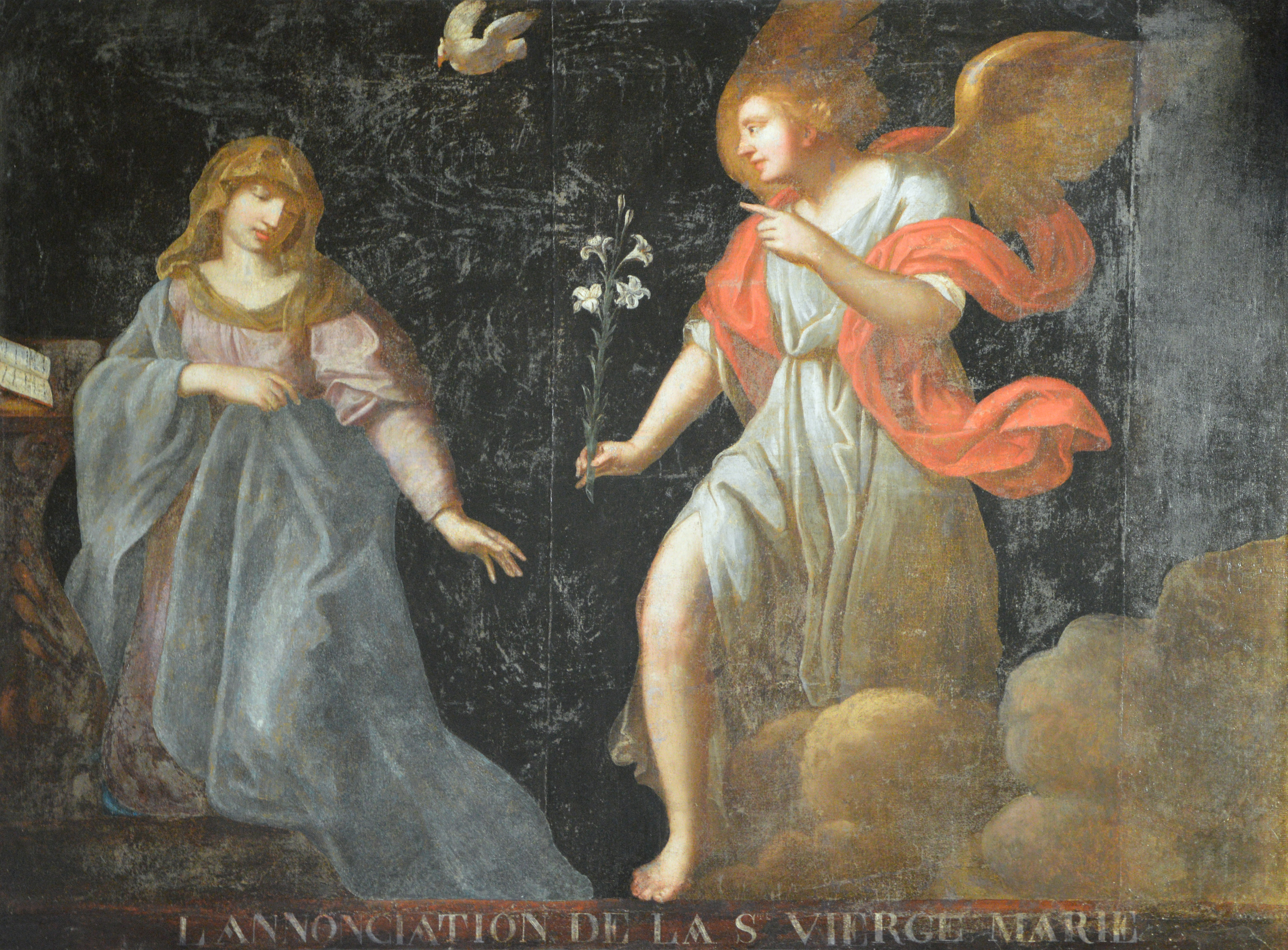 Annonciation dans l'Église de Locmariaquer, Morbihan